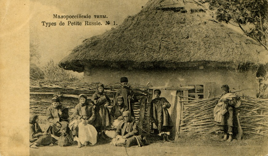 Дореволюционная открытка Российской империи из серии «Малороссийские типы».